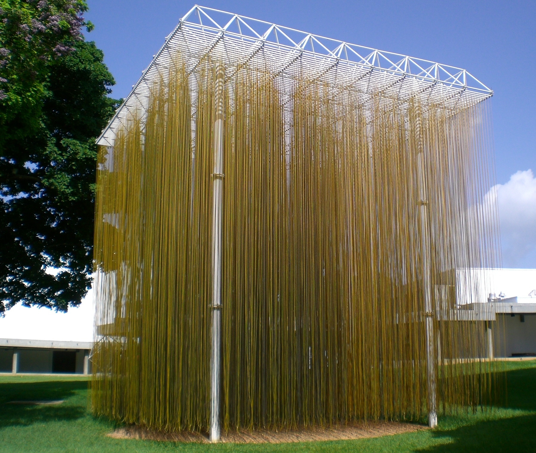 Soto´s Sculpture.